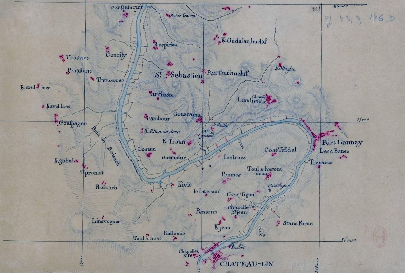 Carte de la région de Châteaulin et Port-Launay publiée entre 1771 et 1785 (Bibliothèque nationale de France, département Cartes et plans, GESH18PF43DIV3P146D )